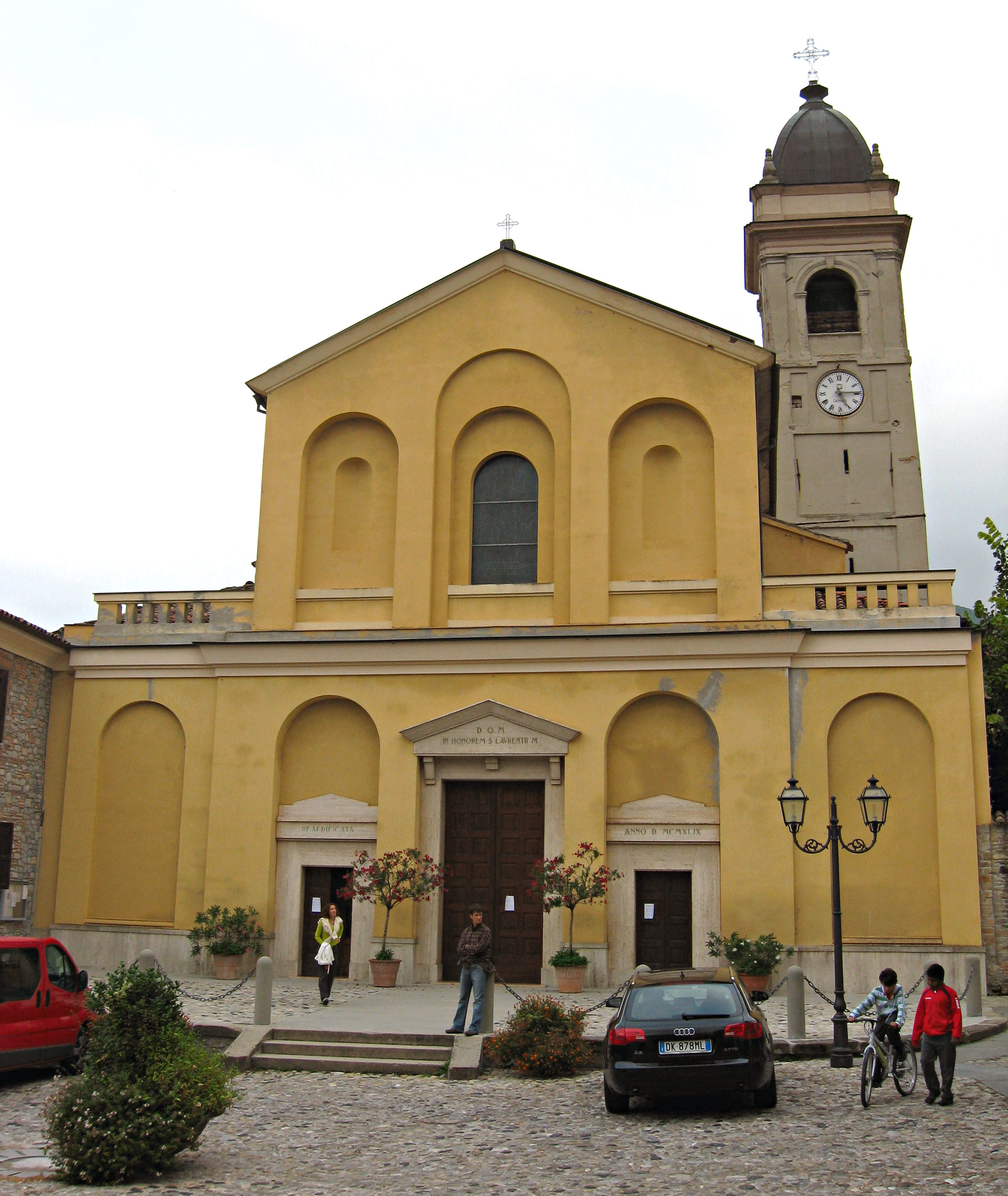 Calestano (PR), chiesa principale